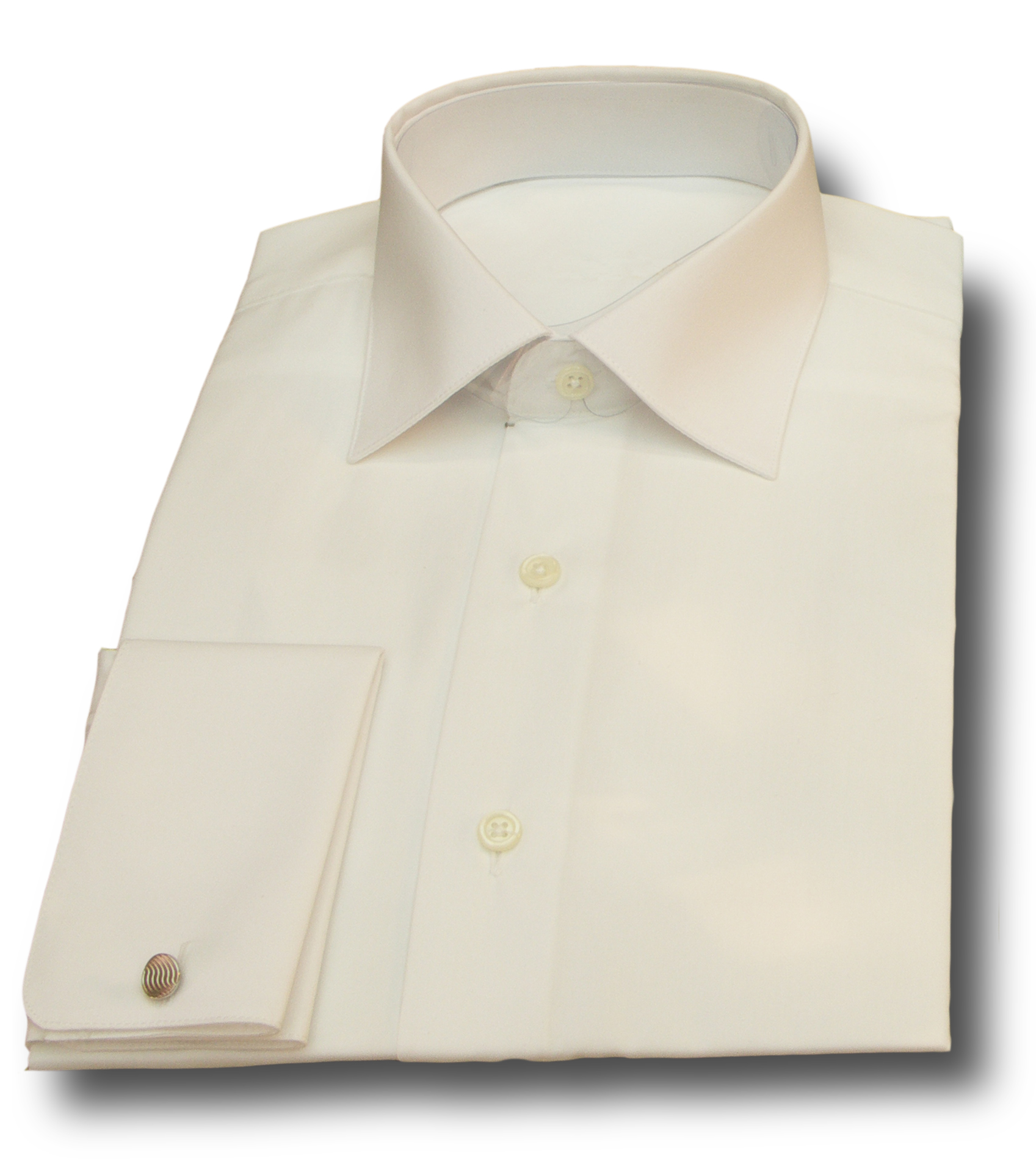 Camisa de puño doble confeccionada en popelín